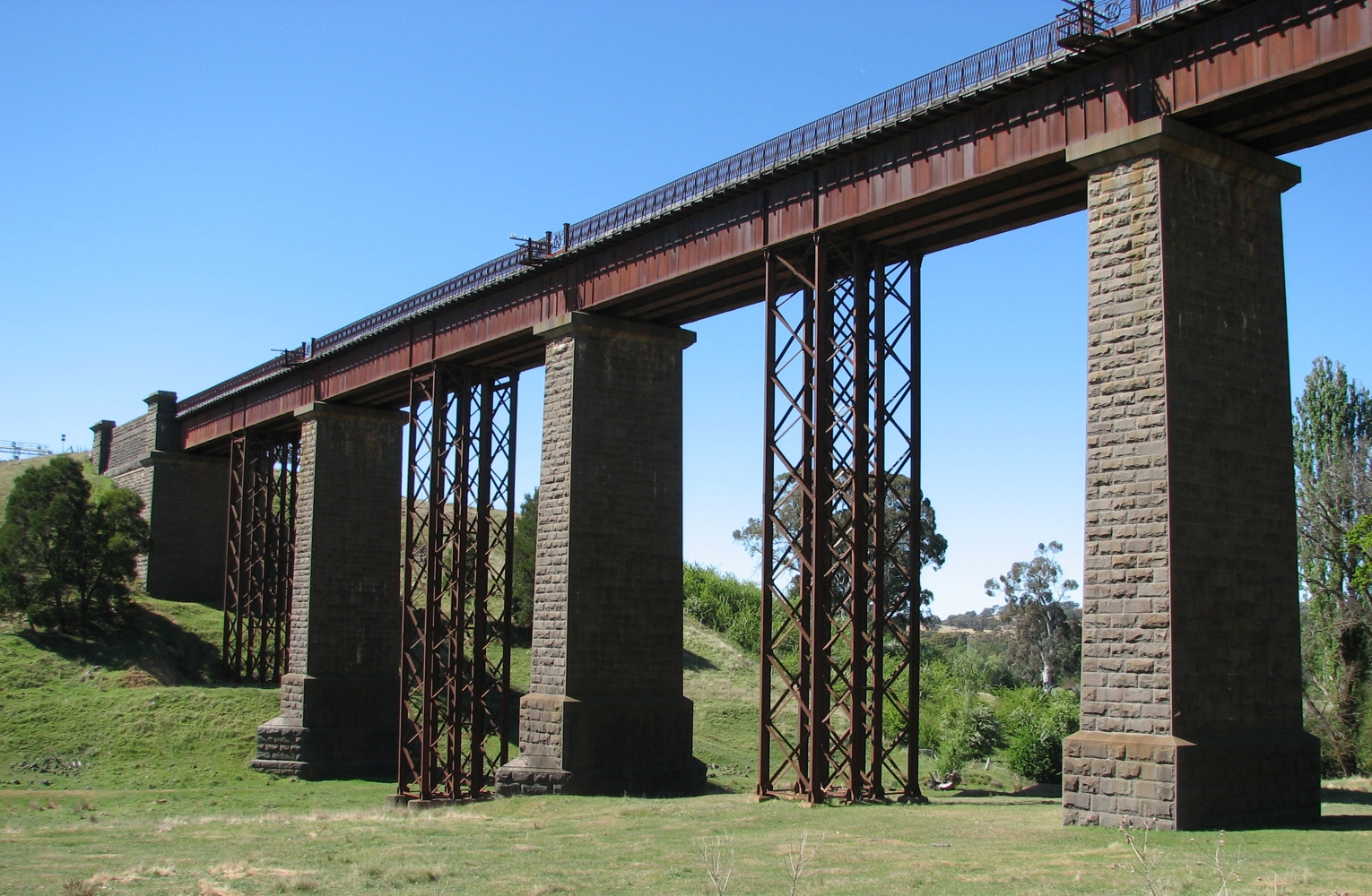 Taradale Viaduct, Taradale, Victoria, Australia.